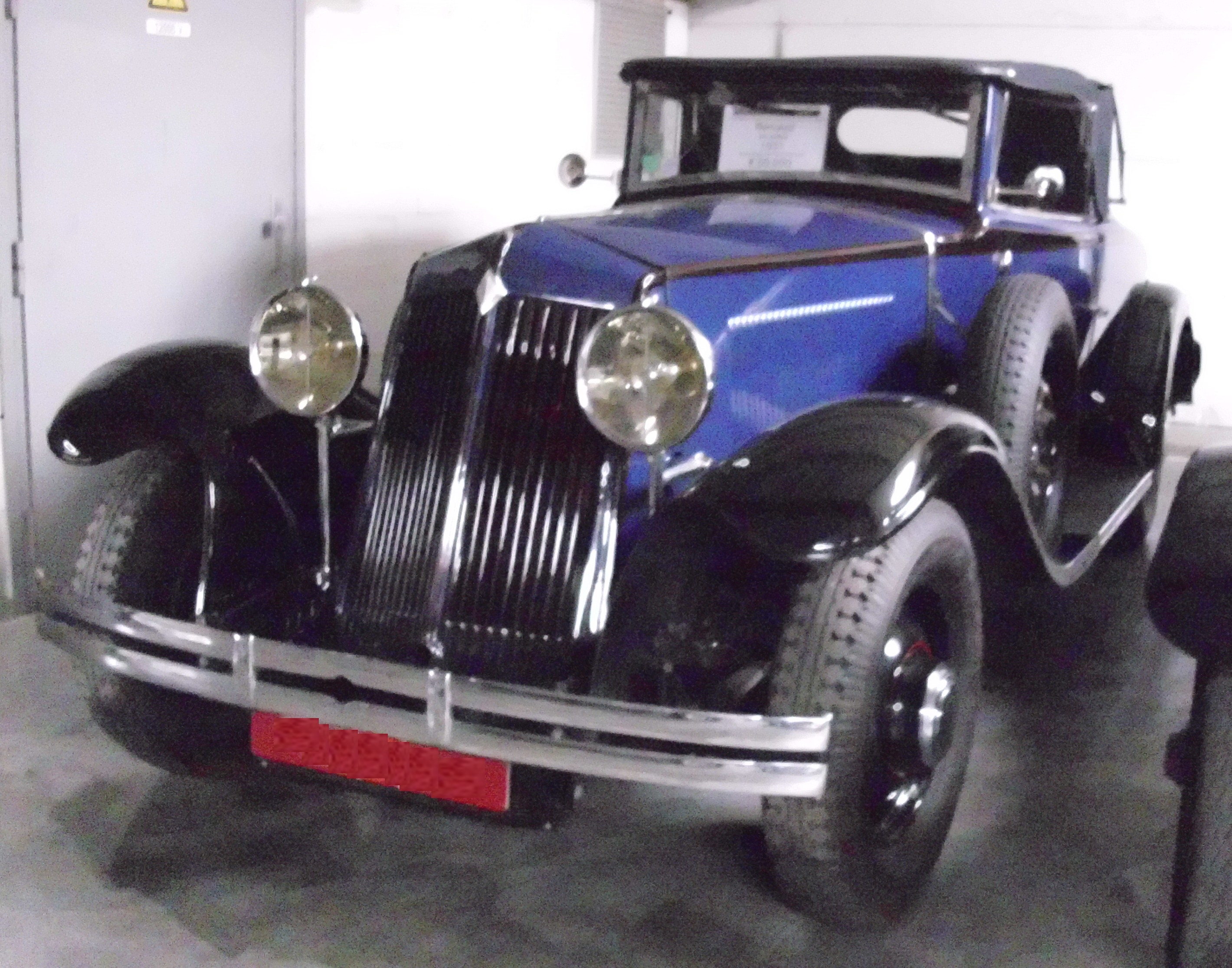 Renault Nervastella Roadster 1931